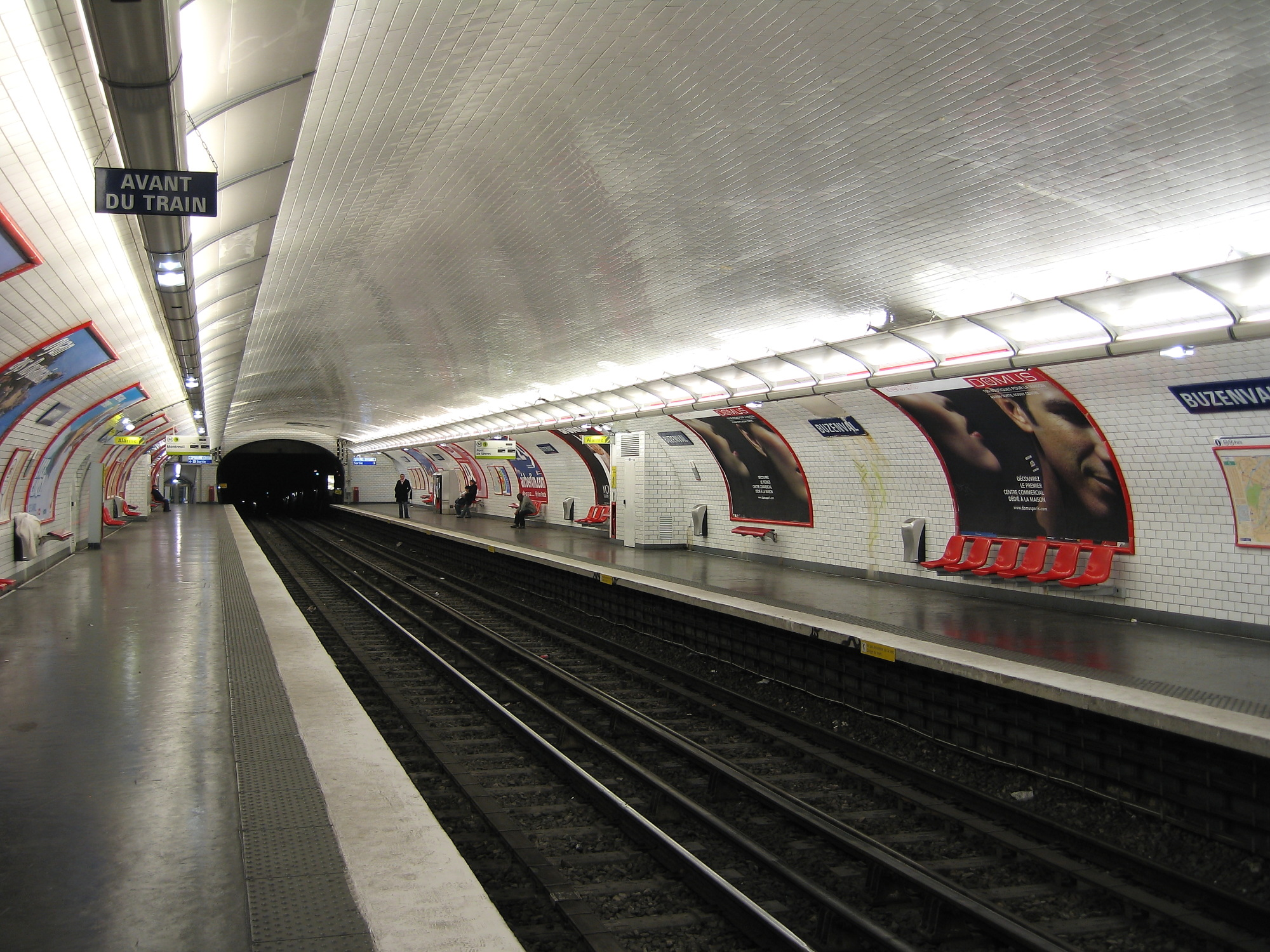 Vue des quais de la station Buzenval du métro de Paris, en direction de Pont de Sèvres.